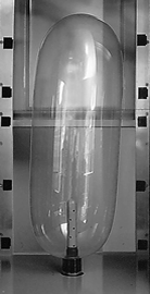 Qualitätstest: Volumentest